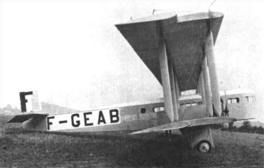 Farman F.60 mit F- Zulassung